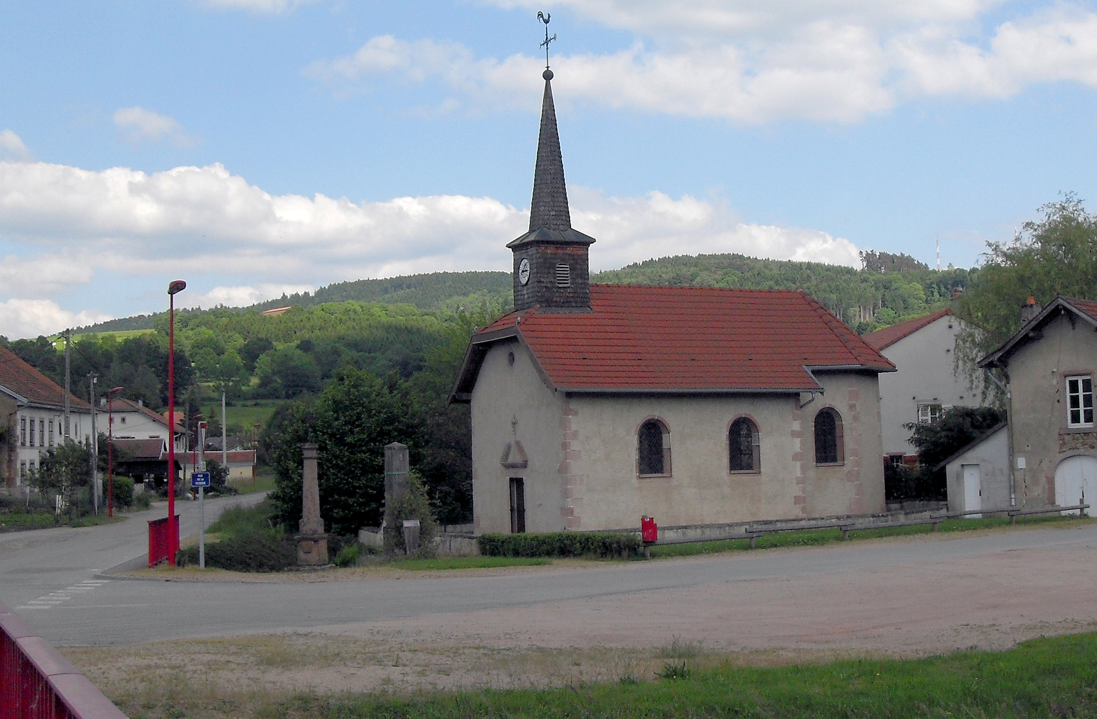 La chapelle Saint-Étienne de Raves